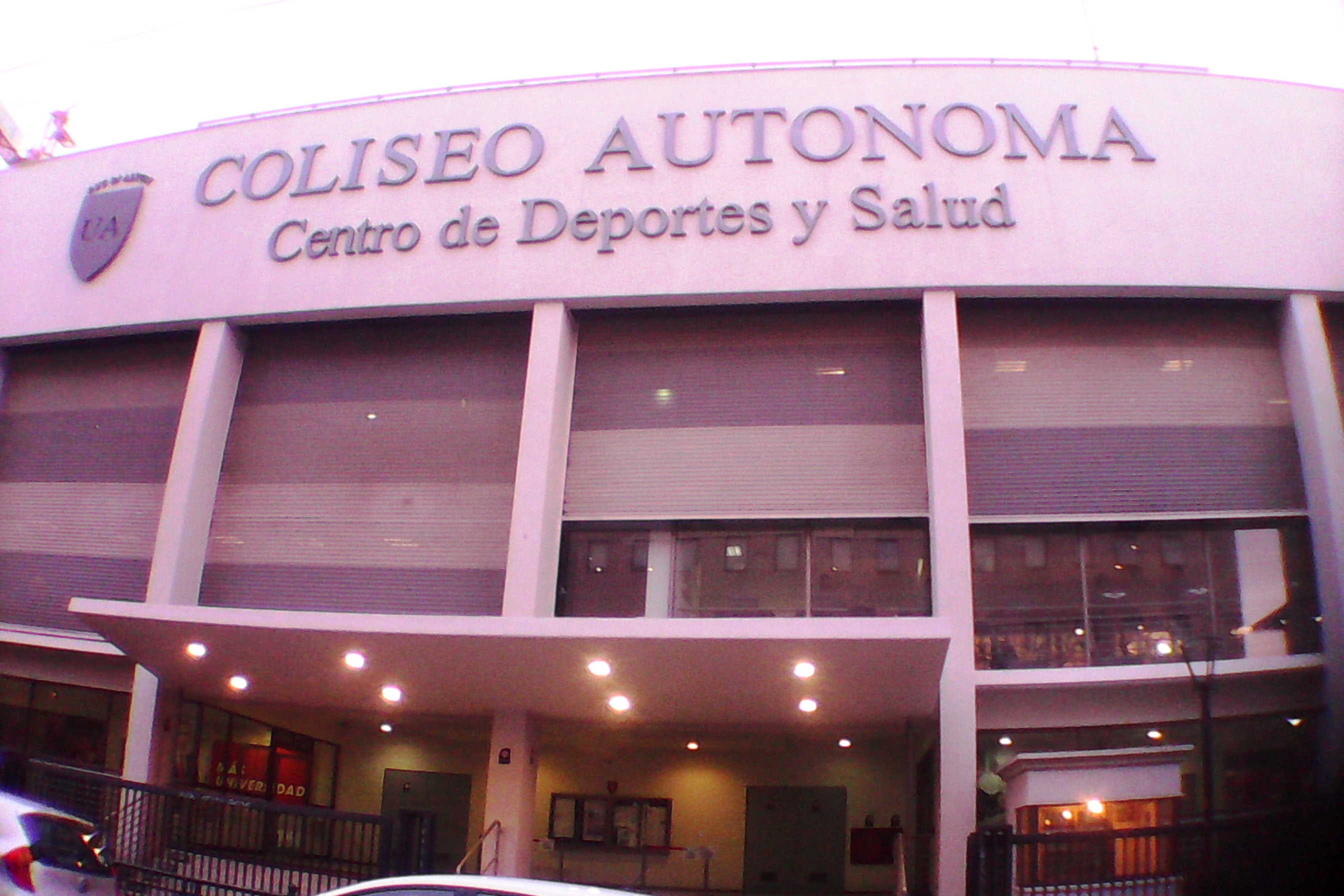 Coliseo Autónoma, centro deportivo de la ciudad de Temuco, Chile, perteneciente a la Universidad Autónoma. En este inmueble, se encuentran los estudios de la Universidad Autónoma de Chile Televisión.